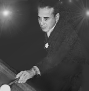 5th. Billard World Campionship (1950-1954)